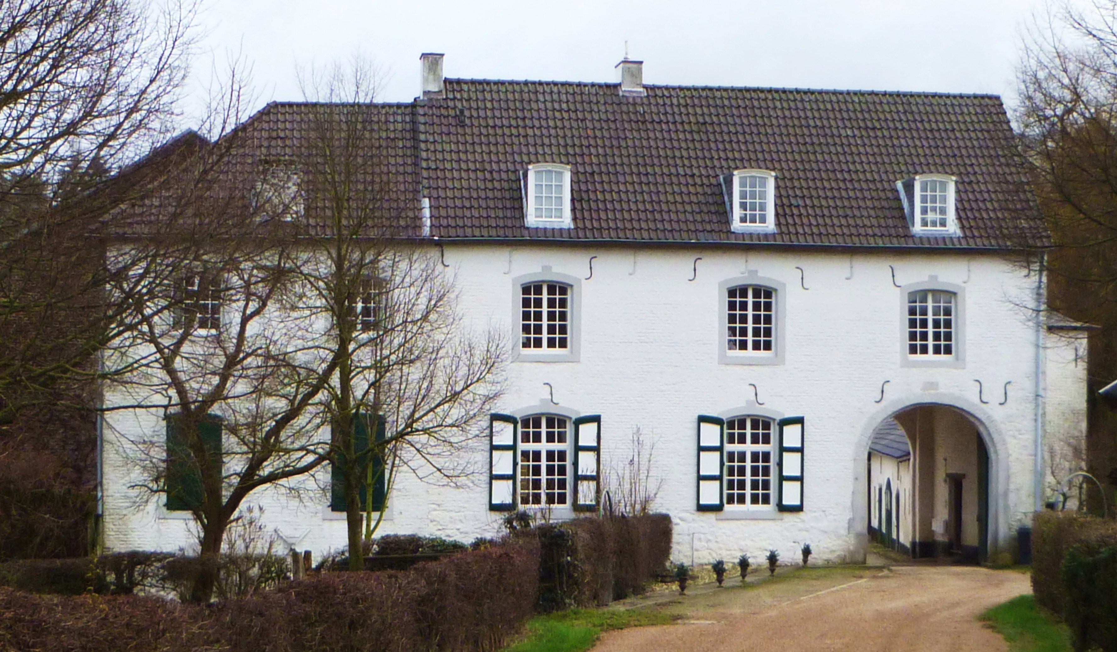 Baudenkmal in Aachen-Mitte; Am Hasselholz - Haus-Nummer 16!